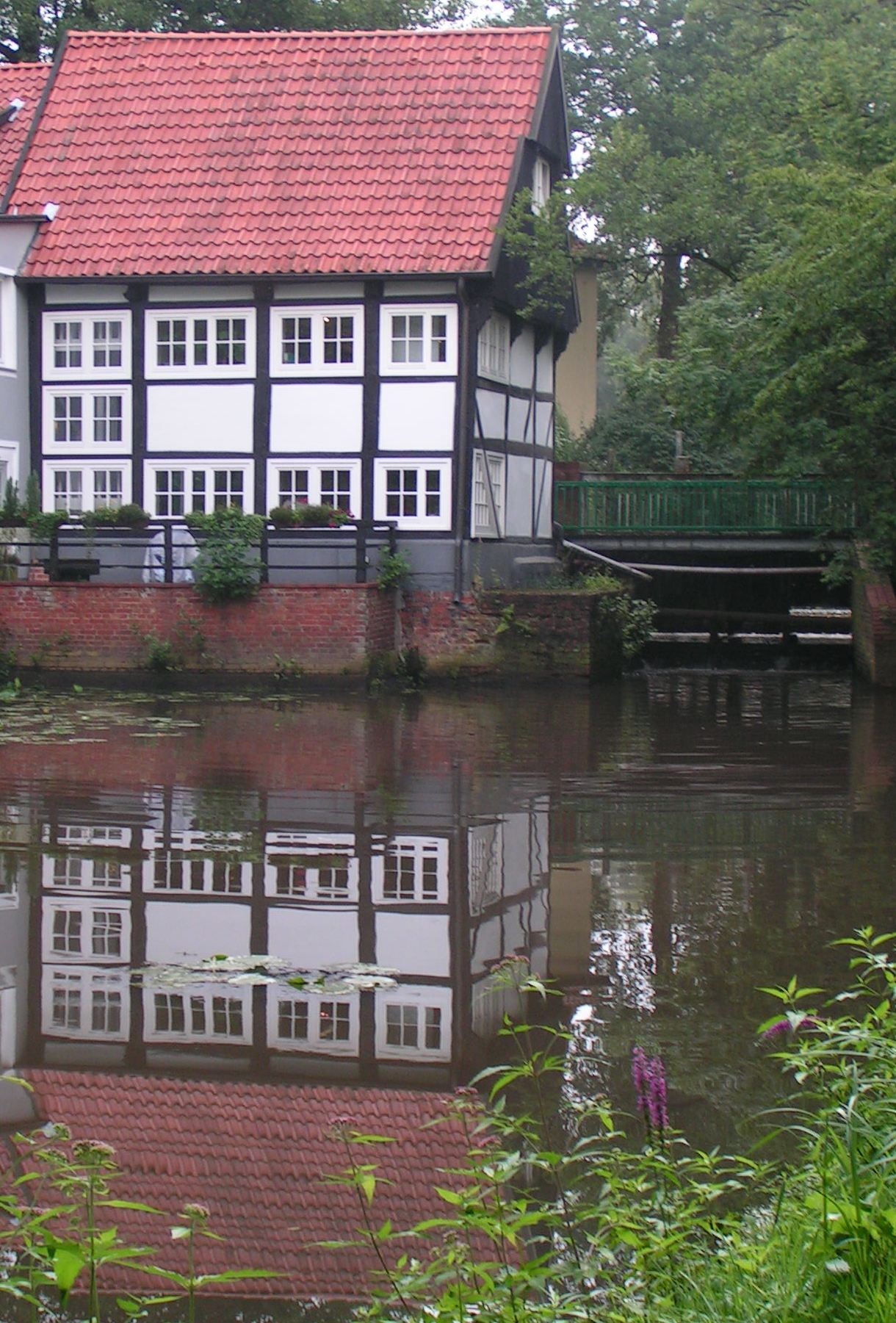 Wassermühle Vechta